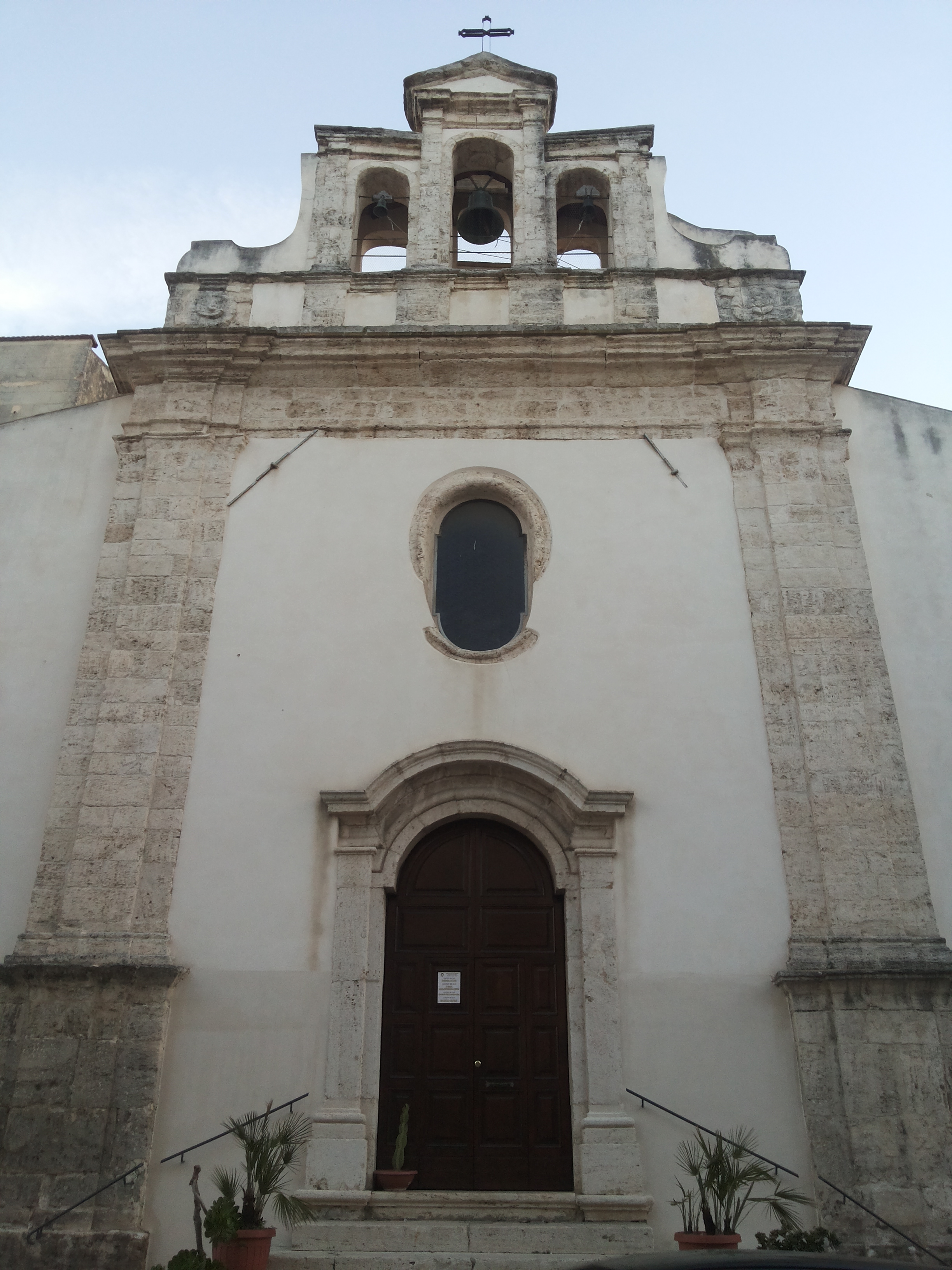 Chiesa della SS Trinità ad Alcamo